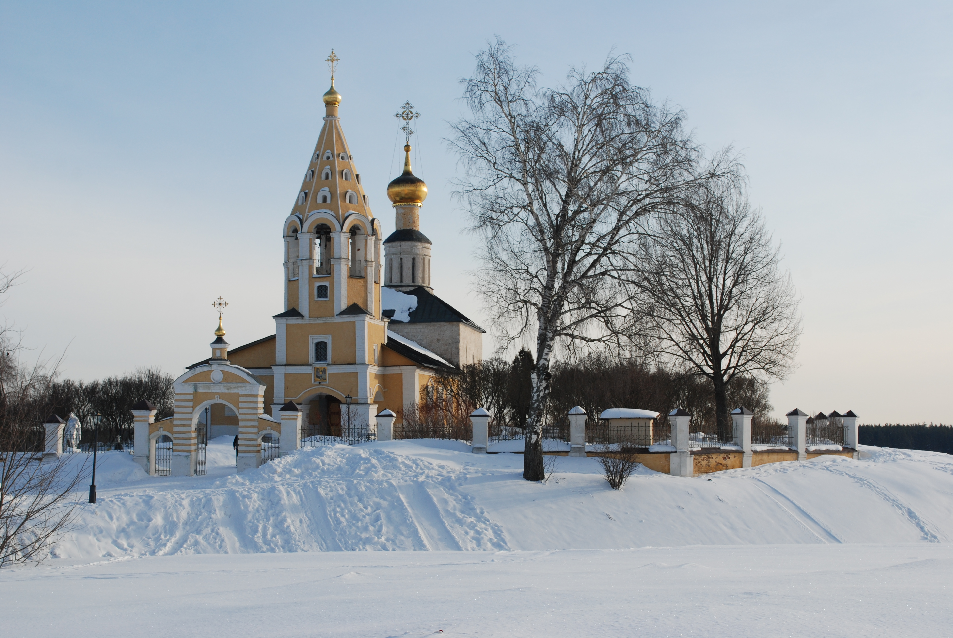 Церковь Рождества Богородицы (Тверская область, Тверь, село Городня)